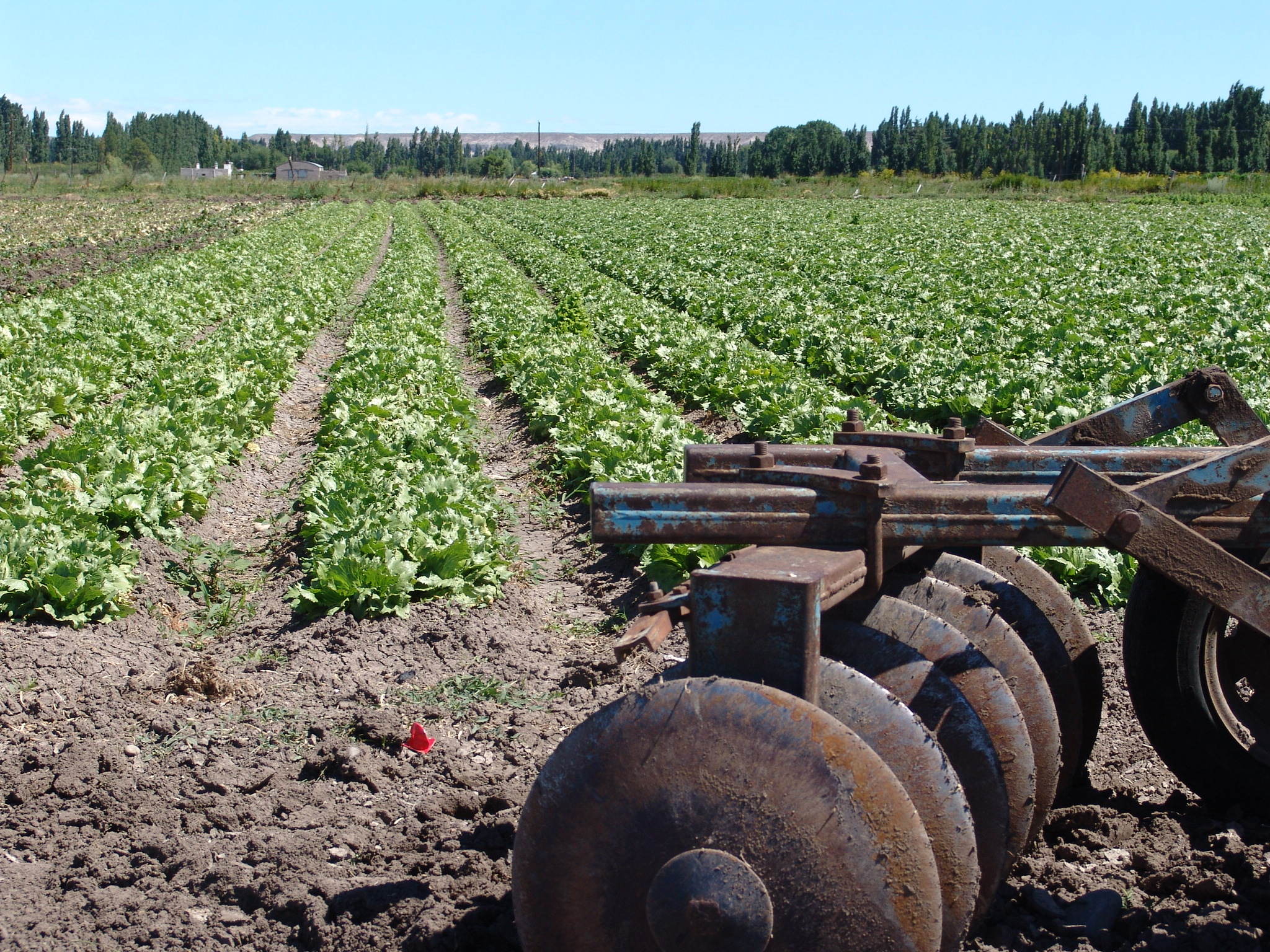 Valle Inferior del Rio Chubut, Argentina